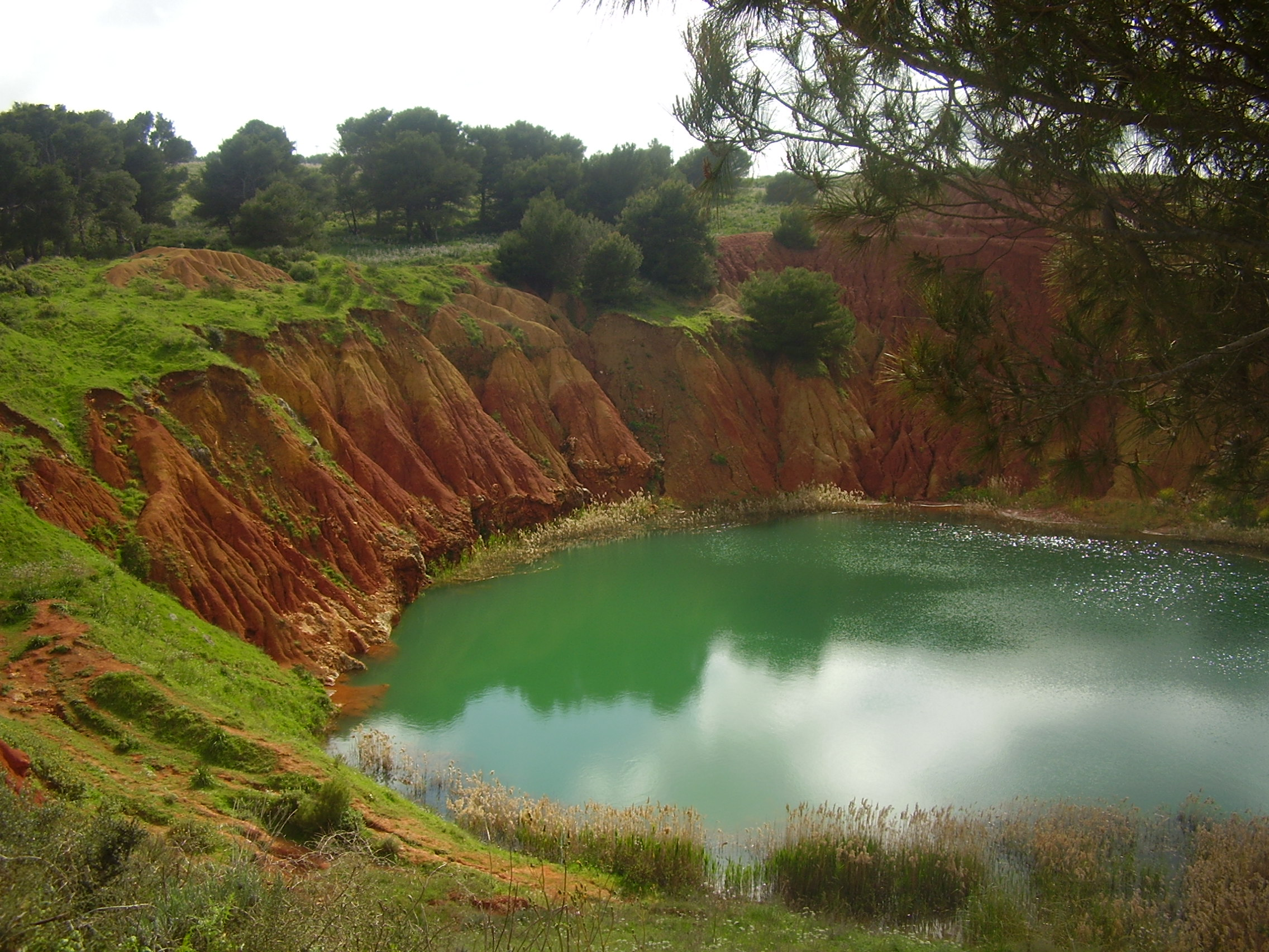 Laghetto di Bauxite Otranto